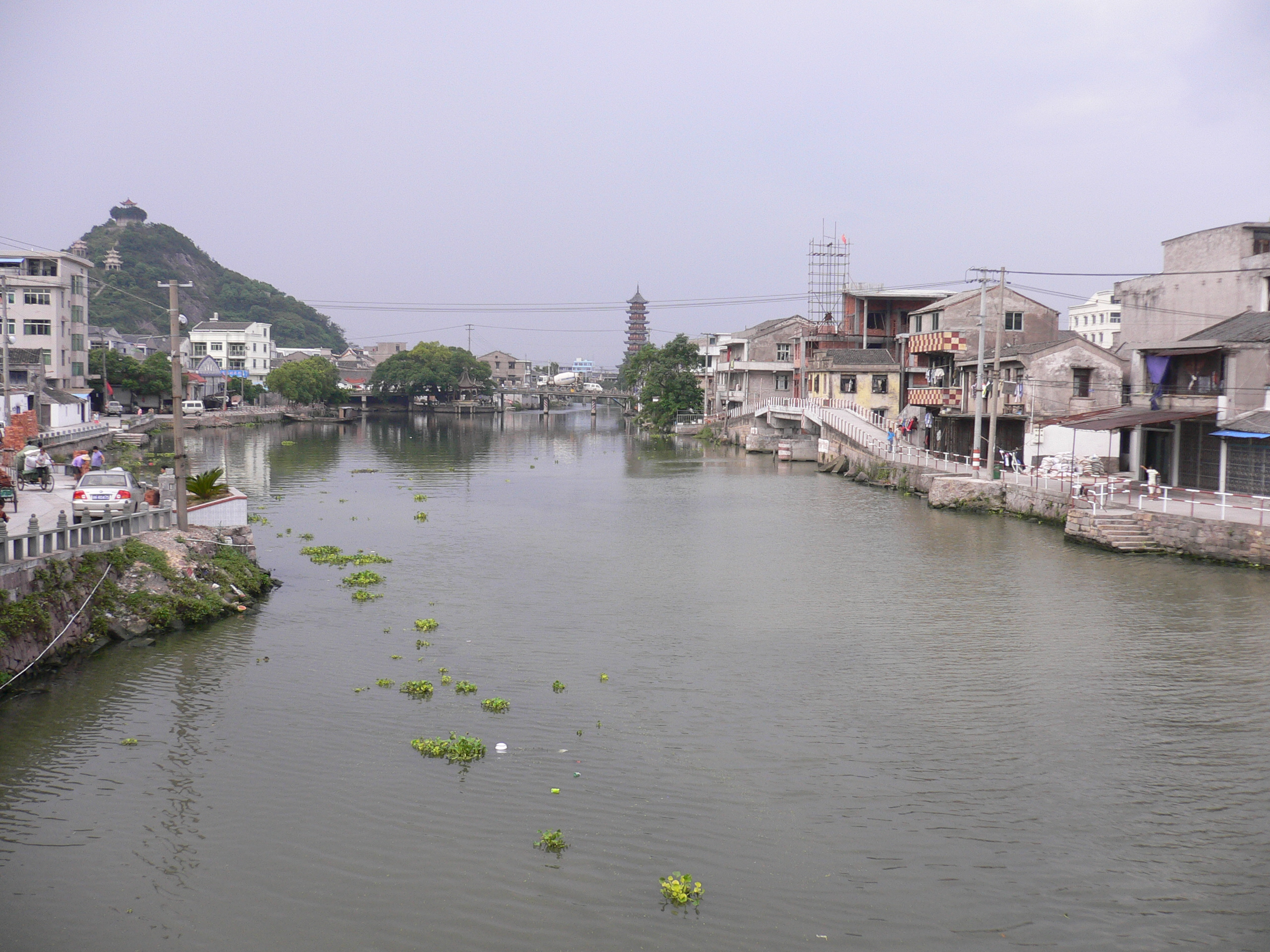 江南水乡--南白象